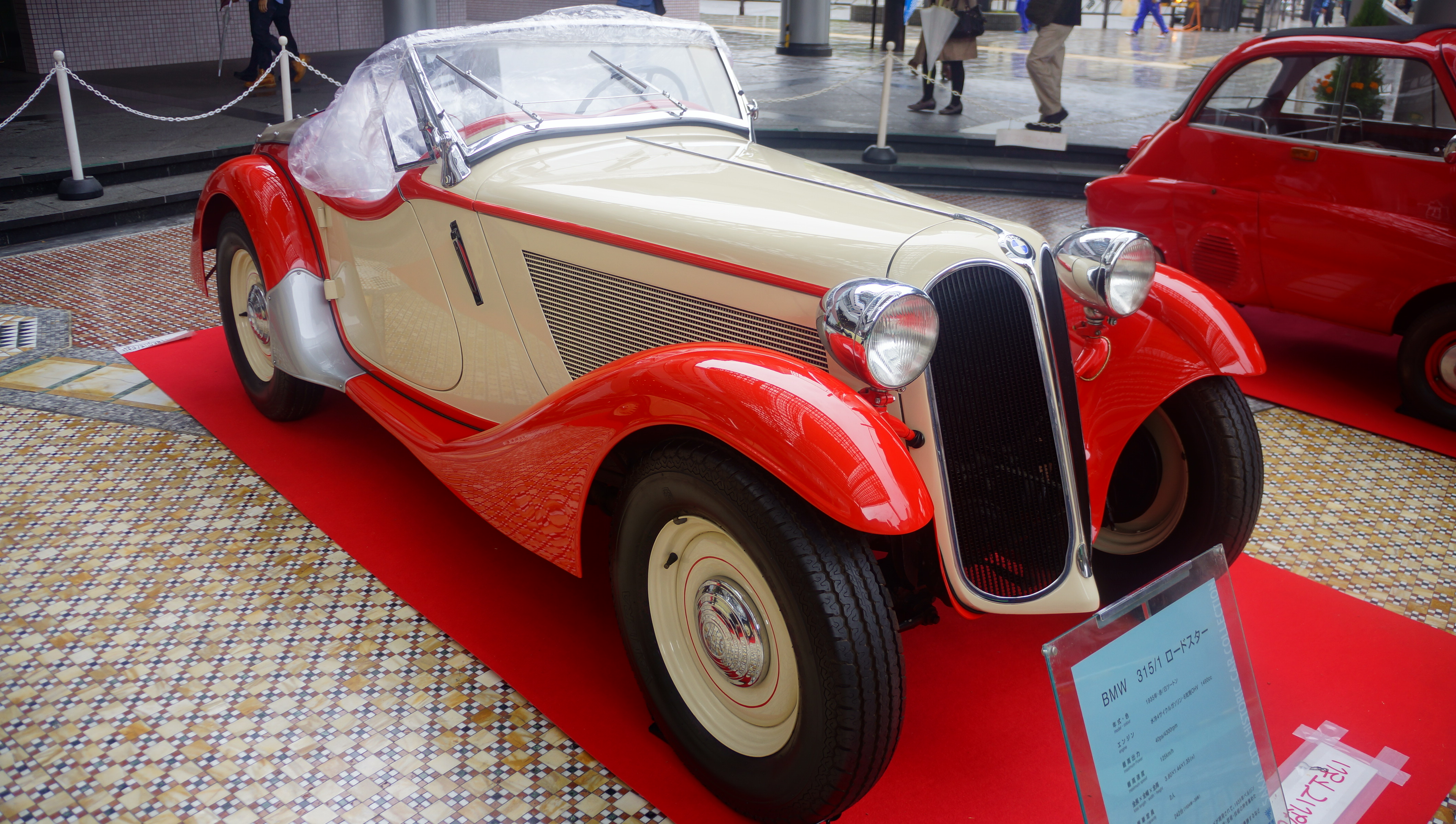 BMW 315/1ロードスター。 13年10月20日 堺市ポルタスセンタービル内ポルタス広場にて。